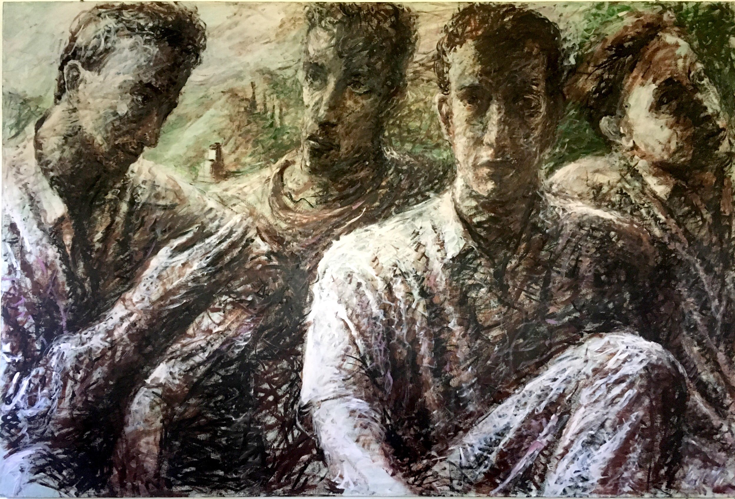 Un'opera con il suo stile iniziale di tratti e pennellate energiche, dove si vedono ritrattati insieme a lui gli amici all'epoca